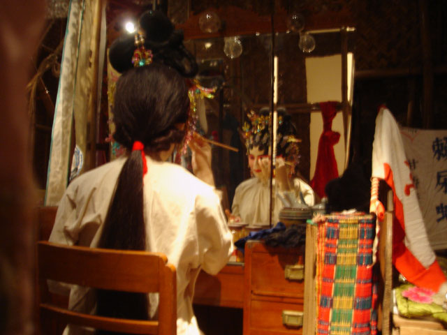 香港历史博物馆内的粤剧后台化妆场景